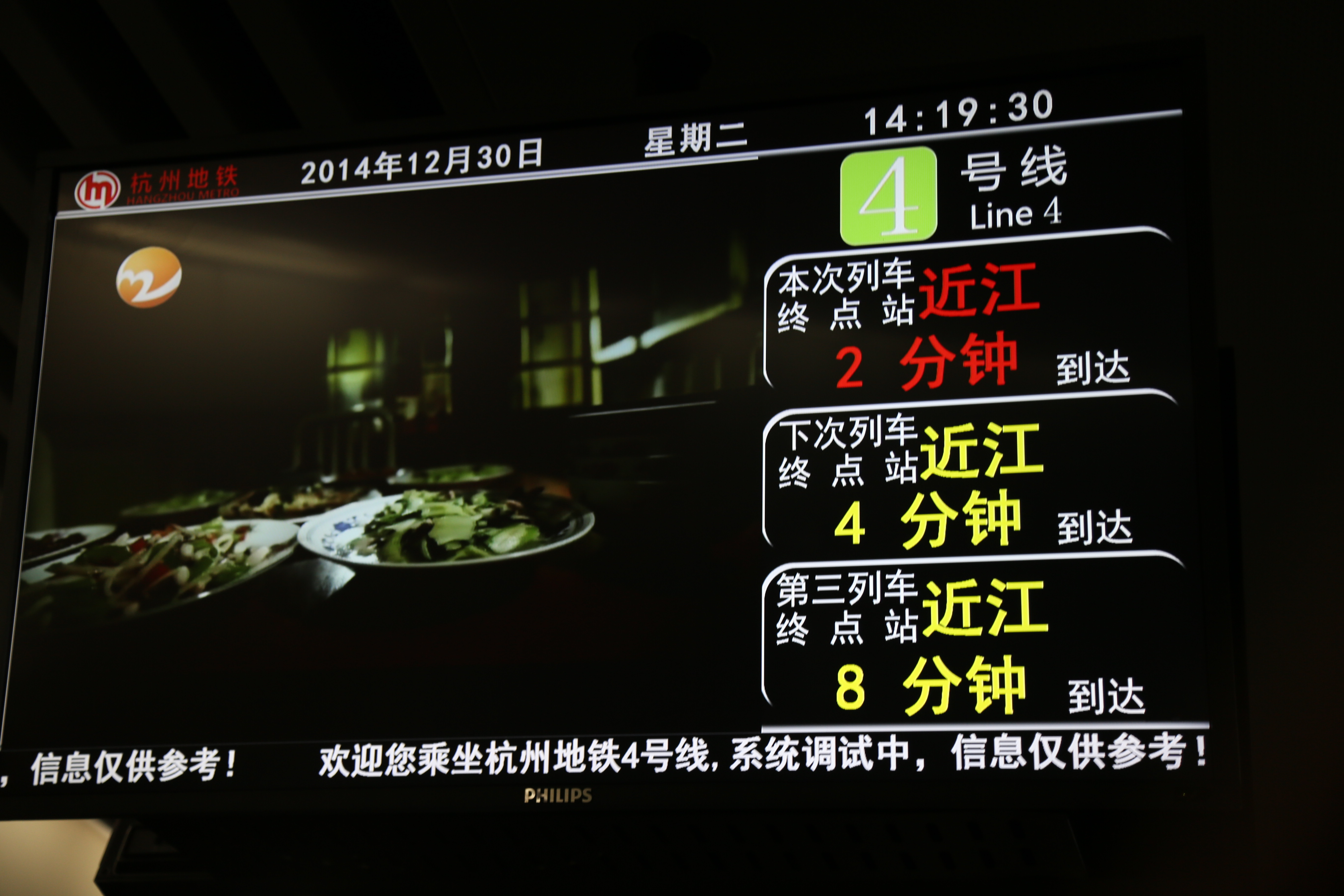 4号线PIDS屏